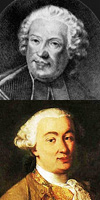 Metastasio and Carlo Goldoni, librettists for Baldassare Galuppi